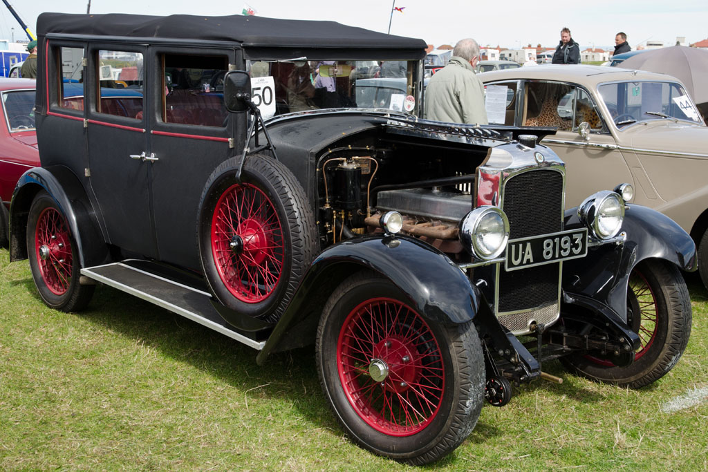 Vauxhall 20/60 (6-cylinder) cabriolet circa 1928 Llandudno Transport Festival 04/05/2013